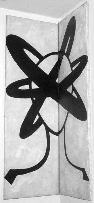 Titel: Der Denker, ( Eckbildmalerei ) besteht aus 2 Leinwände Technik: Öl und Silikon auf Leinwand Deminsion: 2 x (140 cm x 45 cm) Ursprungsland: Berlin, Germany